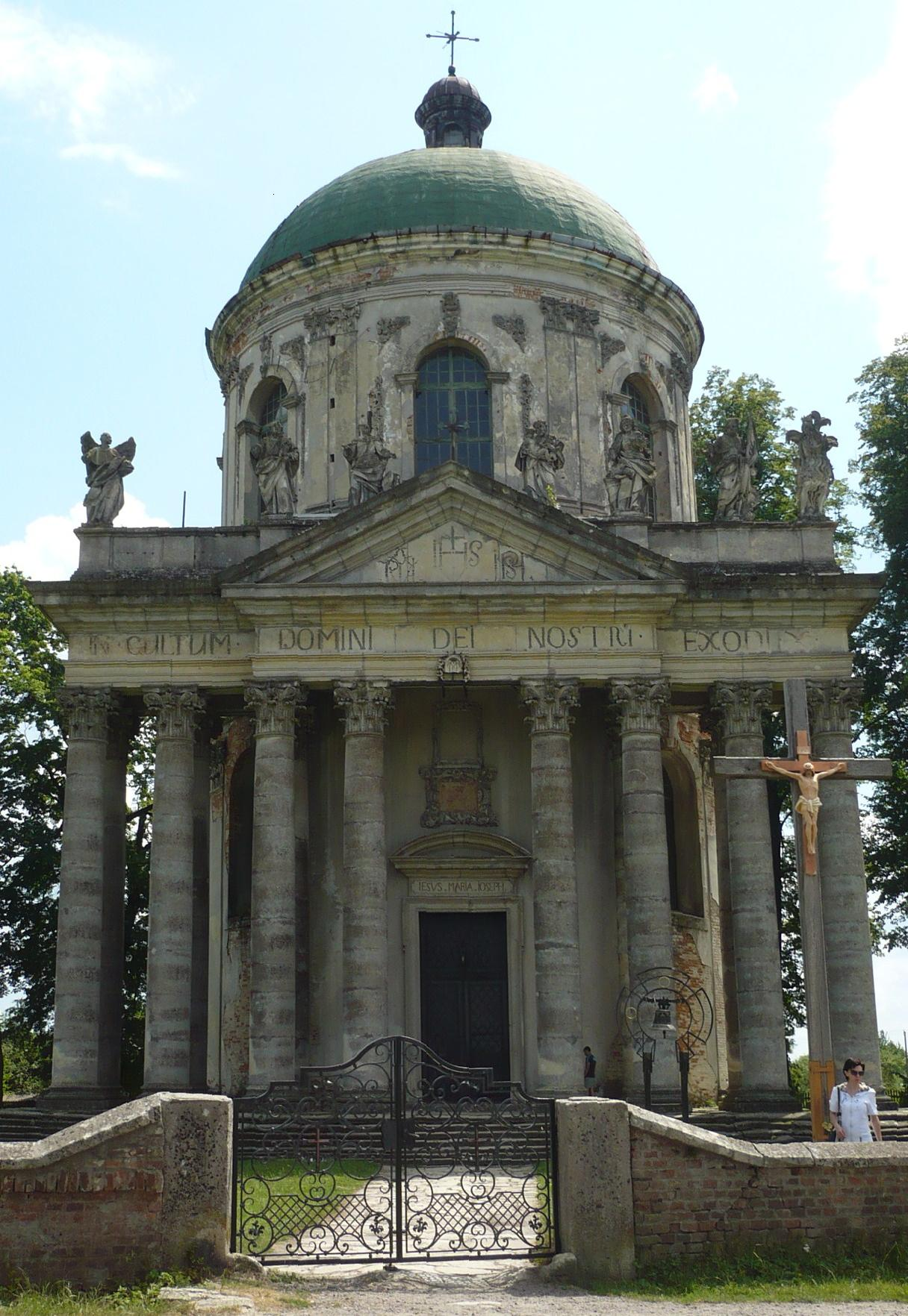 Kościół w Podhorcach